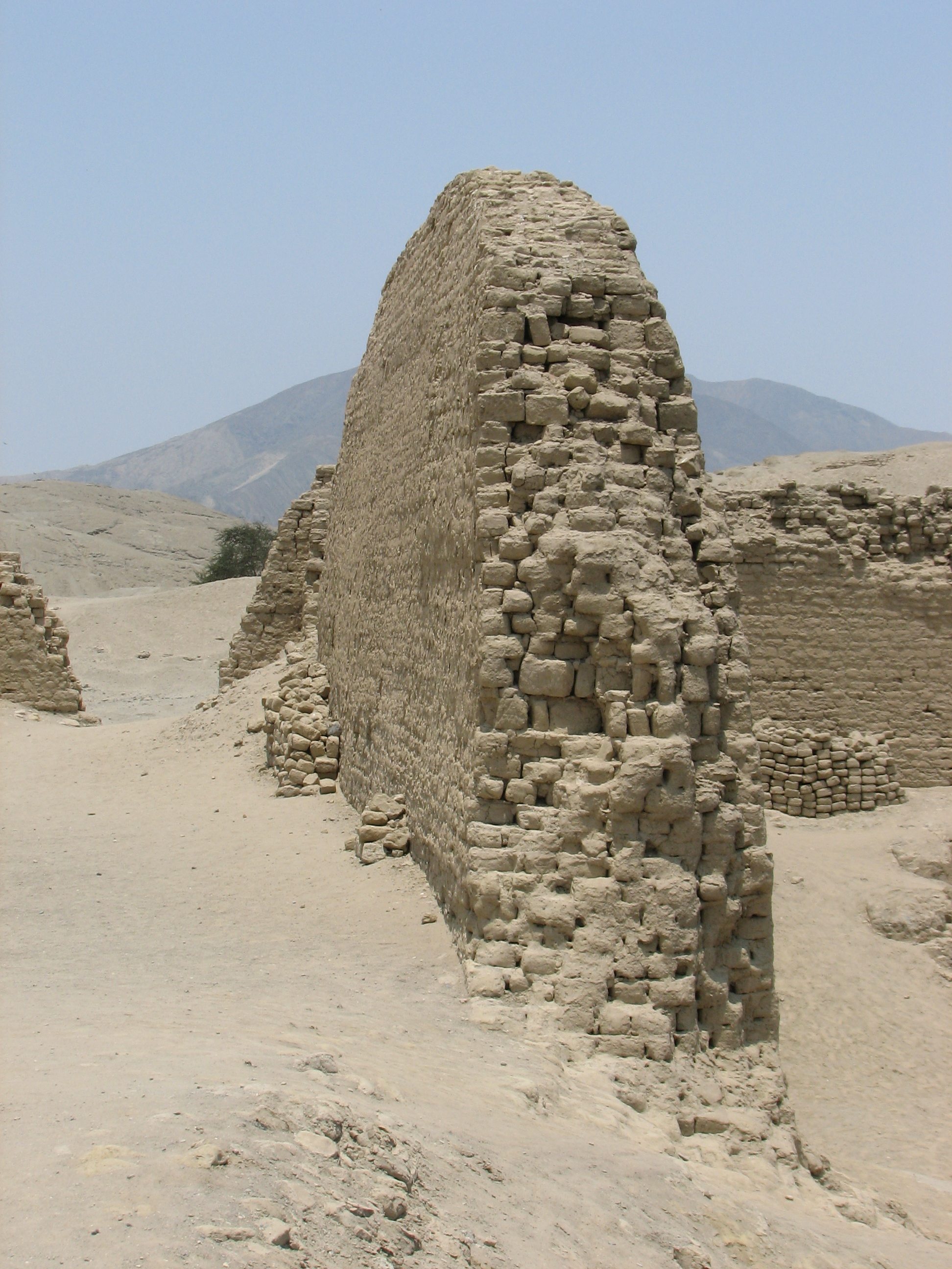 Pañamarca Archaeological site (wall)